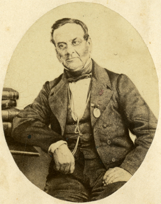 Reproducción fotográfica de un retrato pictórico del escritor y poeta uruguayo Francisco Acuña de Figueroa (1791 - 1862).